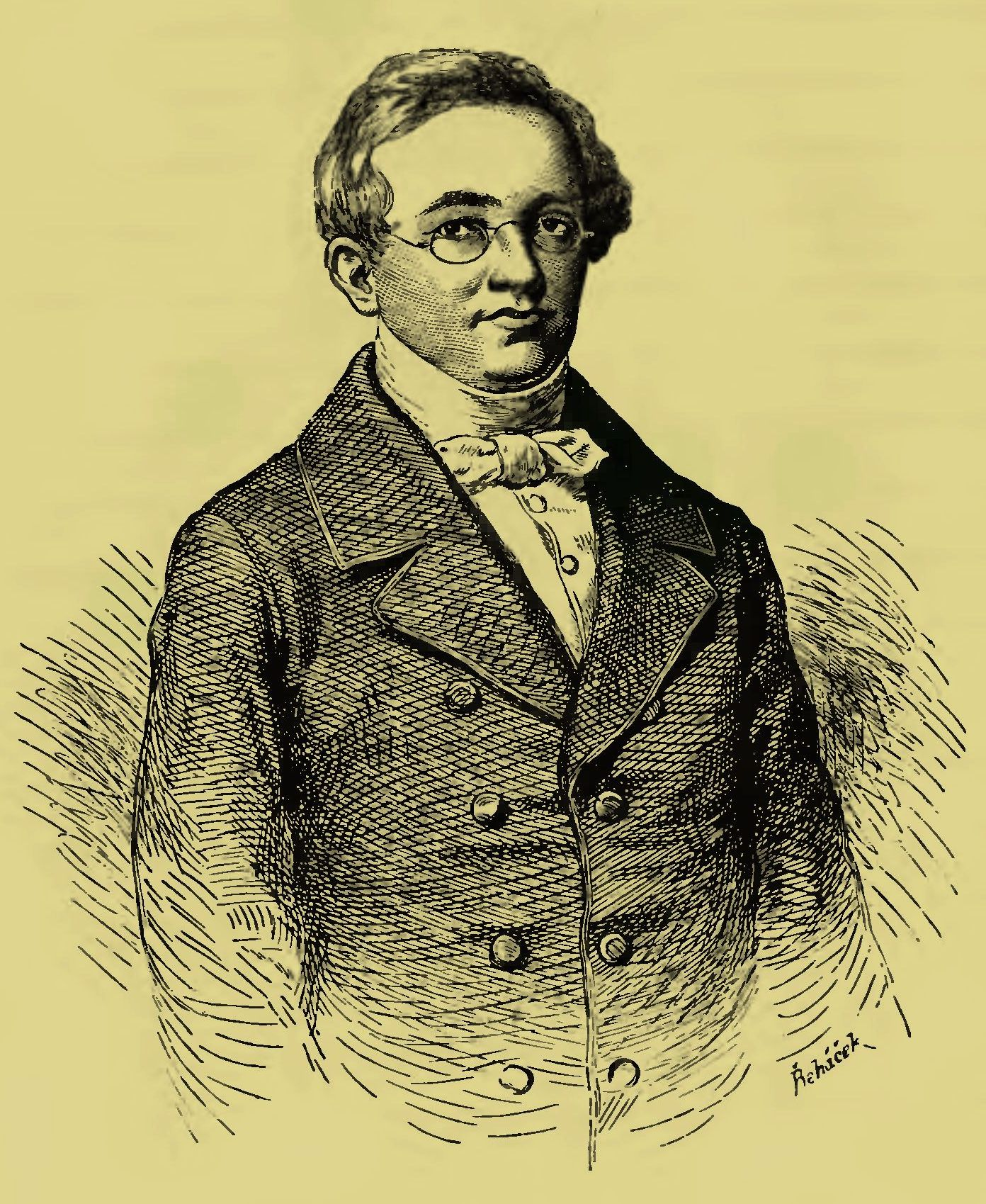 Josef František Smetana (1801-1861), český kněz, přírodovědec, básník a národní buditel